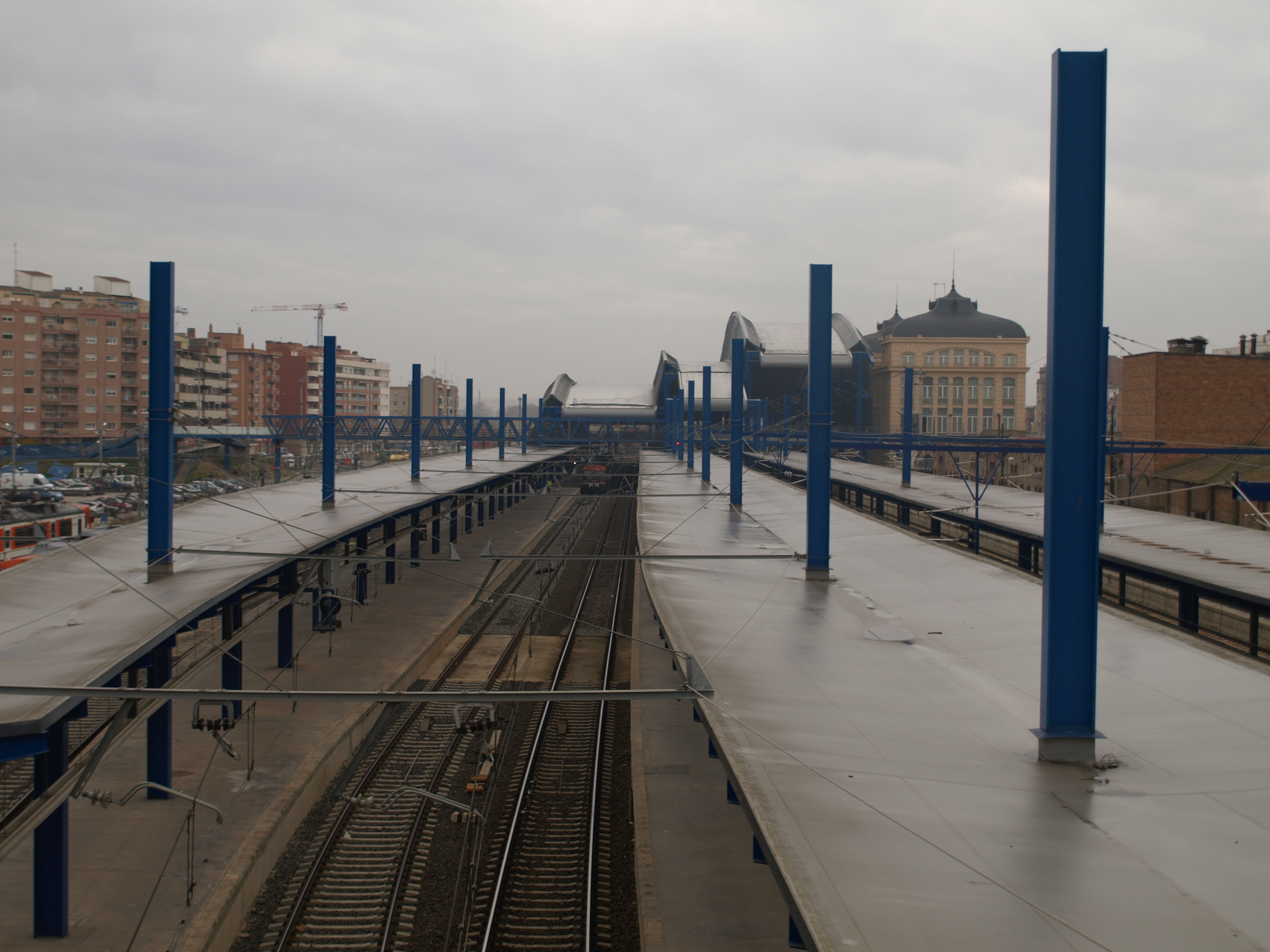 Lleida station platforms